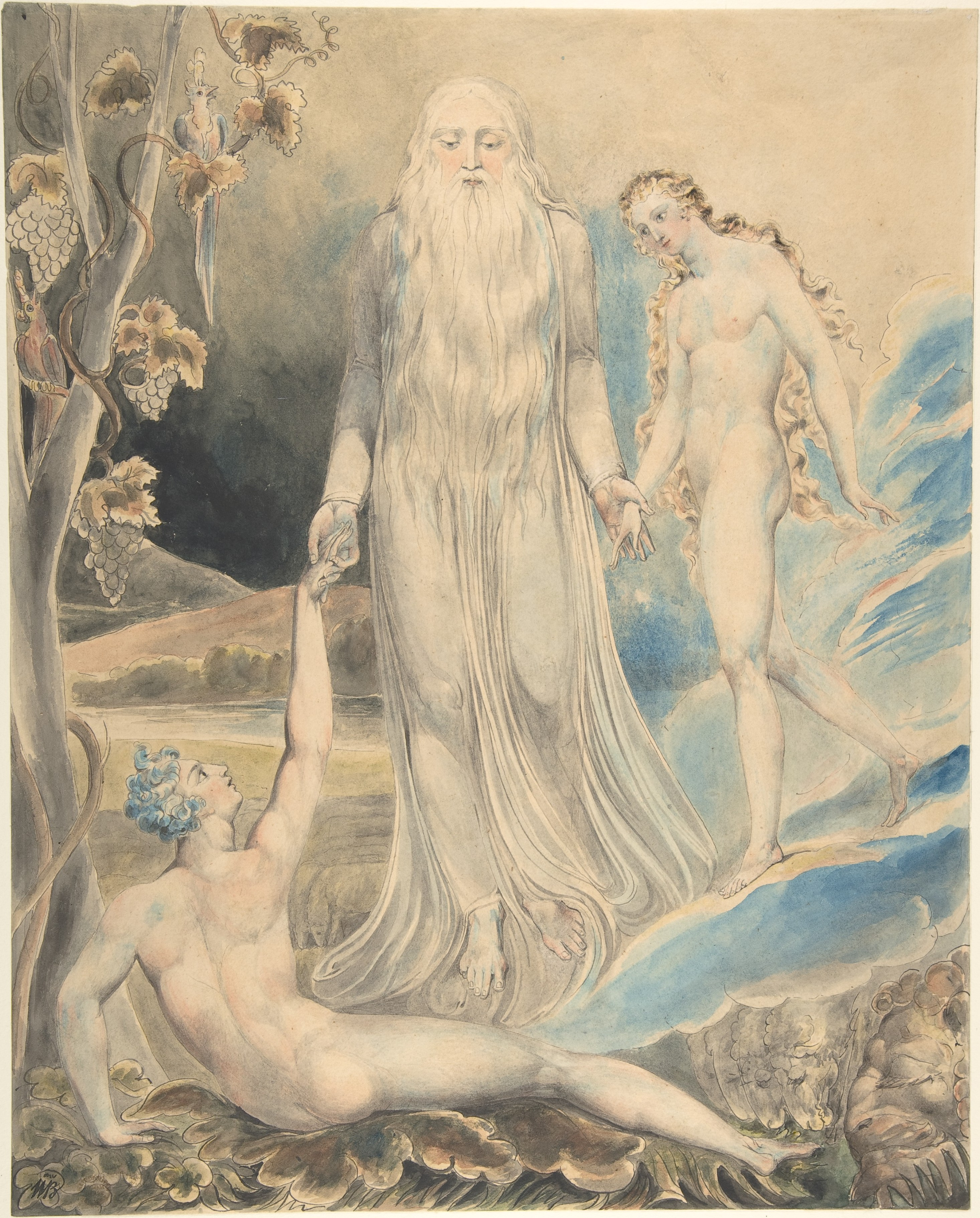 Drawing; Drawings